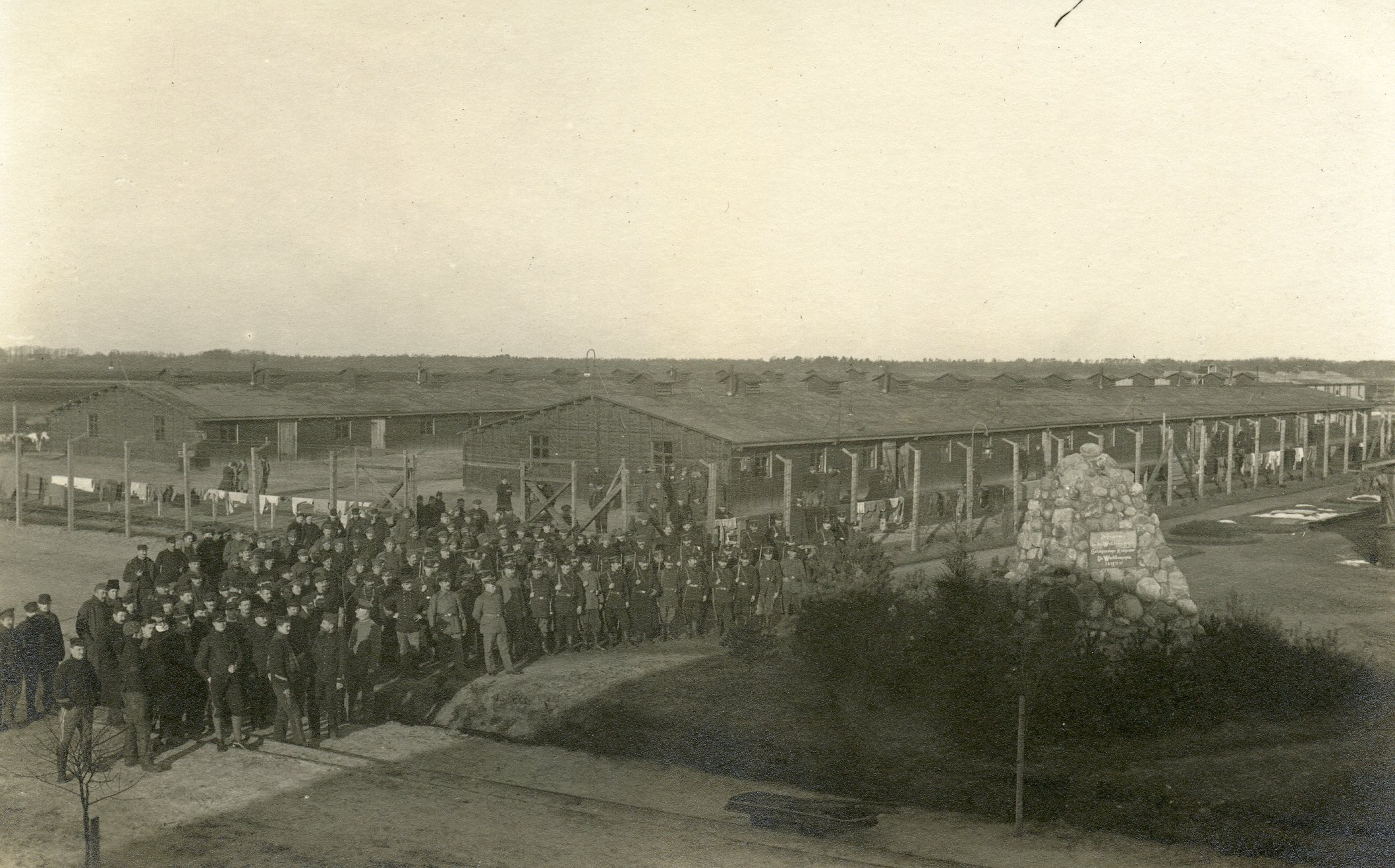 Aus dem Nachlass von Richard Bochalli stammen, neben den Fotografien aus dem Kriegsgefangenenlager von Hameln, auch zahlreiche Fotografien aus anderen Lagern. In diesem Teil der Bilder sind nach den Aufschriften feststellbar die Kriegsgefangenenlager Ahlen-Falkenberger Moor (bei Westerwanna), Haaßel (bei Selsingen), Königsmoor (Kreis Harburg) - alle: Niedersachsen. Mehrere der Bilder sind jedoch unbeschriftet. In diesem ersten Abschnitt befinden sich die Bilder der Anlagen der verschiedenen Kriegsgefangenenlager. Erklärungen in deutsch / englisch am Schluss.